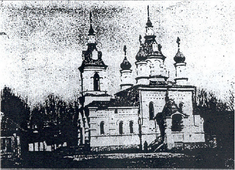 Каменный храм на источнике, где была обретена икона святителя Николая Чудотворца. Ключегорский Казанско-Богородицкого монастырь, Бузулукский уезд Самарской губернии